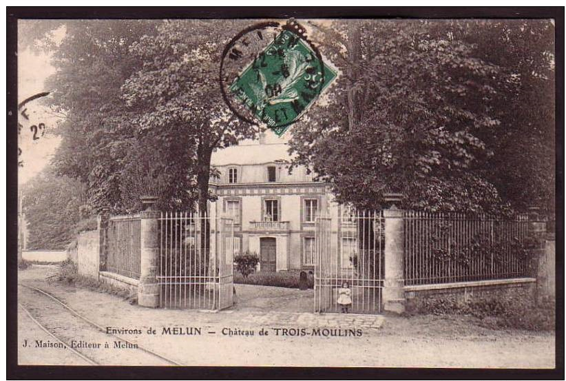 Château des Trois-moulins à Melun. Sur le côté, la voie du tramway de Verneuil au début du XXème siècle.